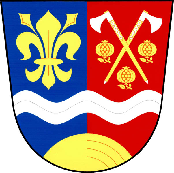 Znak obce Pocinovice